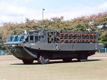 [全長]11,800mm [全幅] 2,800mm（陸上姿勢） 4,000mm（水上姿勢） [全高]3,500mm [全備重量]16,000kg（空車） [乗員]3名 [最高速度] 50km/h（陸上車輪走行） 11km/h（6kt）（水中プロペラ推進） [最大出力]239kW/2,800rpm [開発]防衛庁技術研究本部 [製作]日立造船 平成2年度から開発し、平成6年度に制式器材として制定された。海岸の水際地雷原を構成するために使用する。